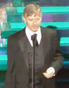 Dave Foley